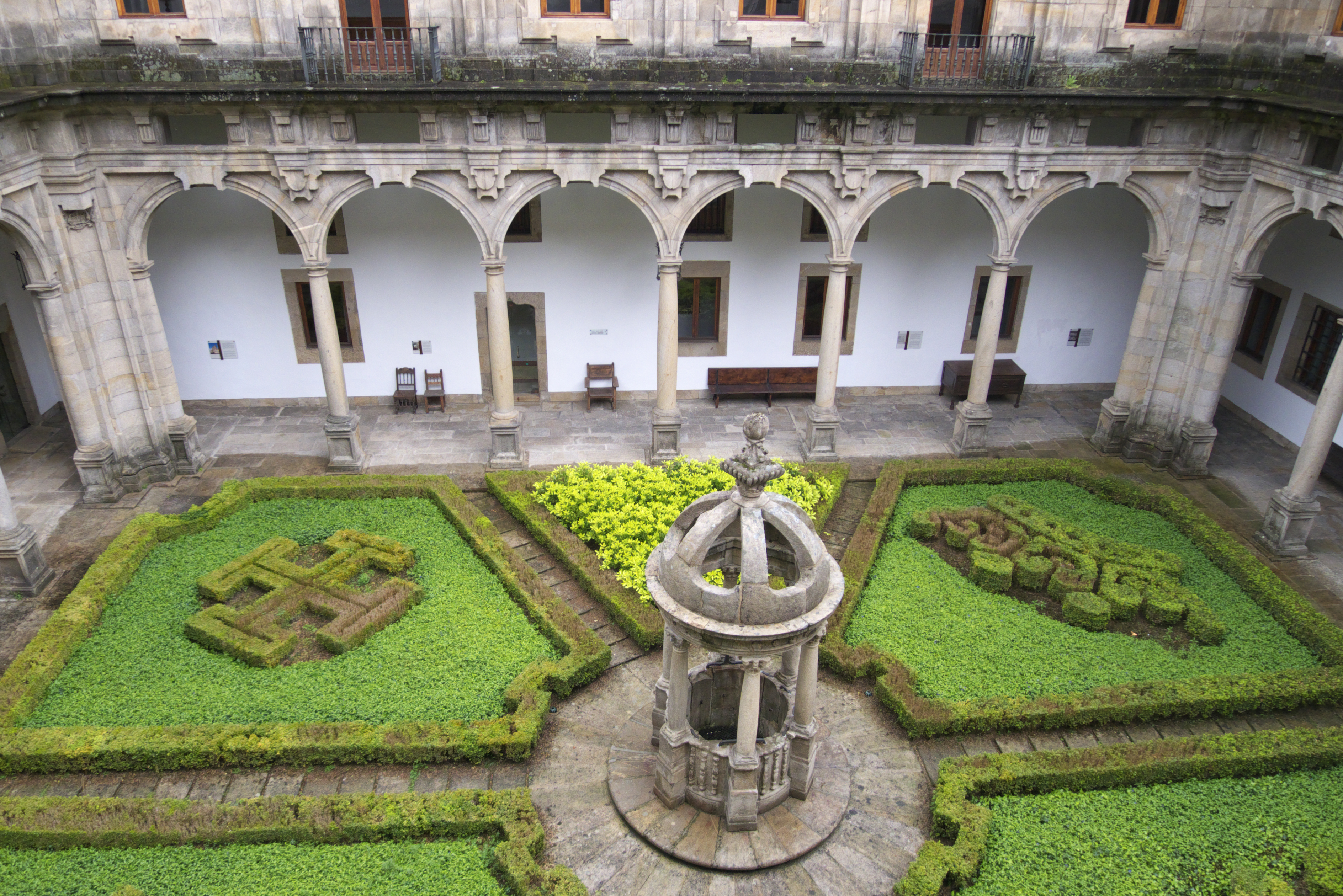 Proyecta, el dominico fray Manuel de los Mártires, autor de la famosa escalera de entrada a la iglesia del monasterio de San Martín Pinario, y lo realiza Lucas Ferro Caaveiro. Junto a construcción del patio barroco de San Lucas, modifican las trazas de Enrique Egas.